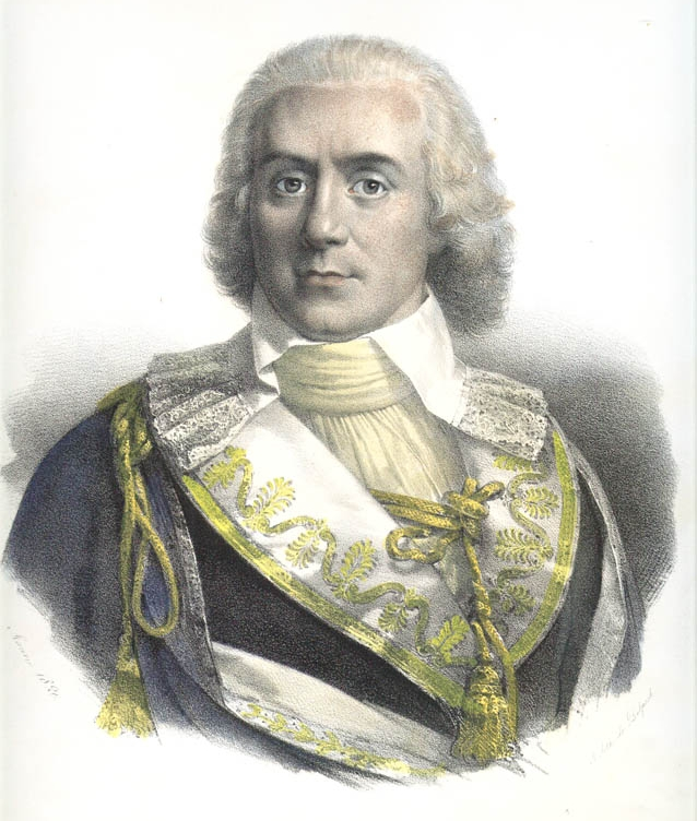 Paul-François, vicomte de Barras. Lithographie publiée par François-Séraphin Delpech en 1826, d'après un portrait par Nicolas-Eustache Maurin [1], [2].